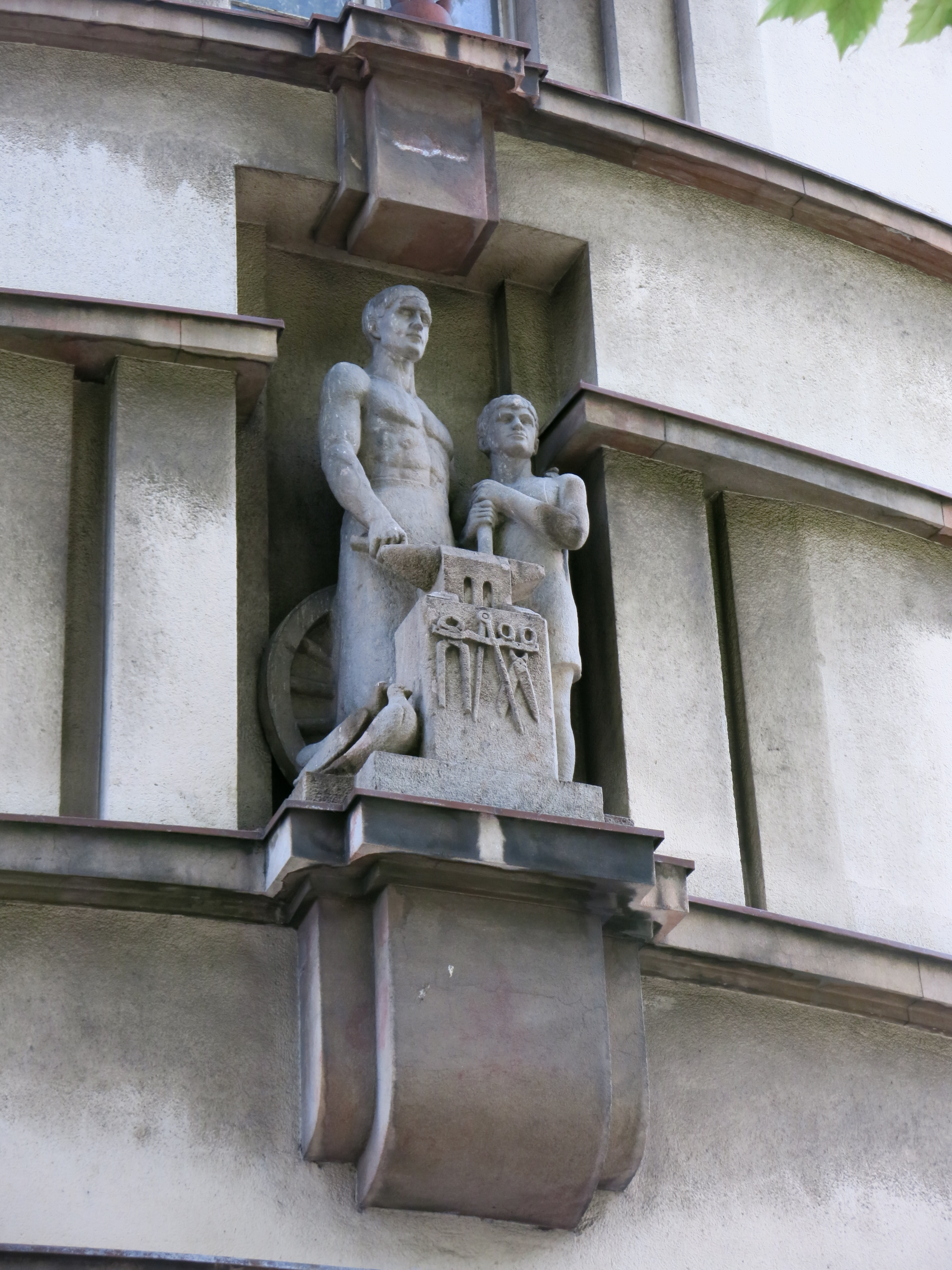 Занатски дом